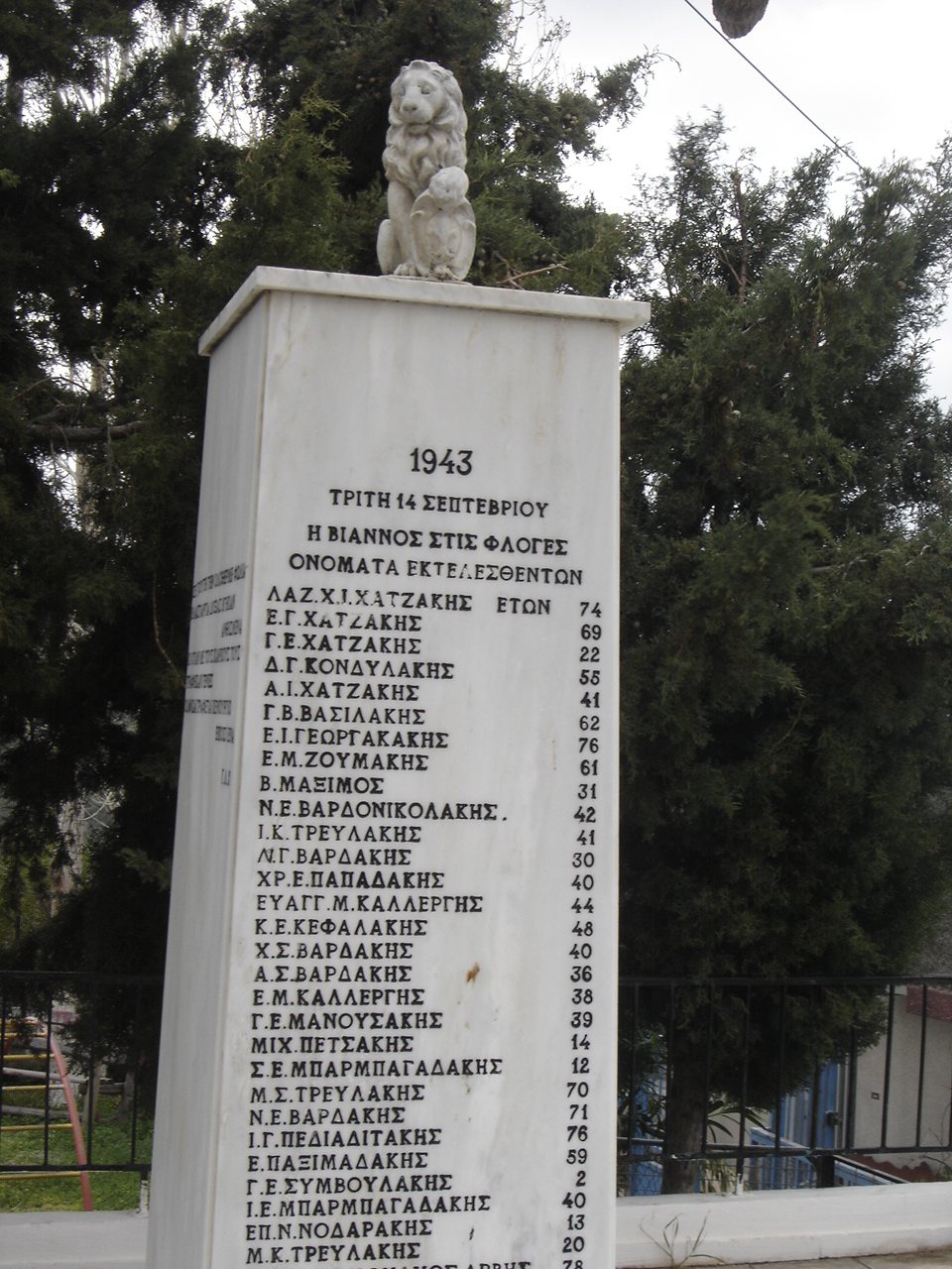 War memorial in Agios Vassilios , Viannos.